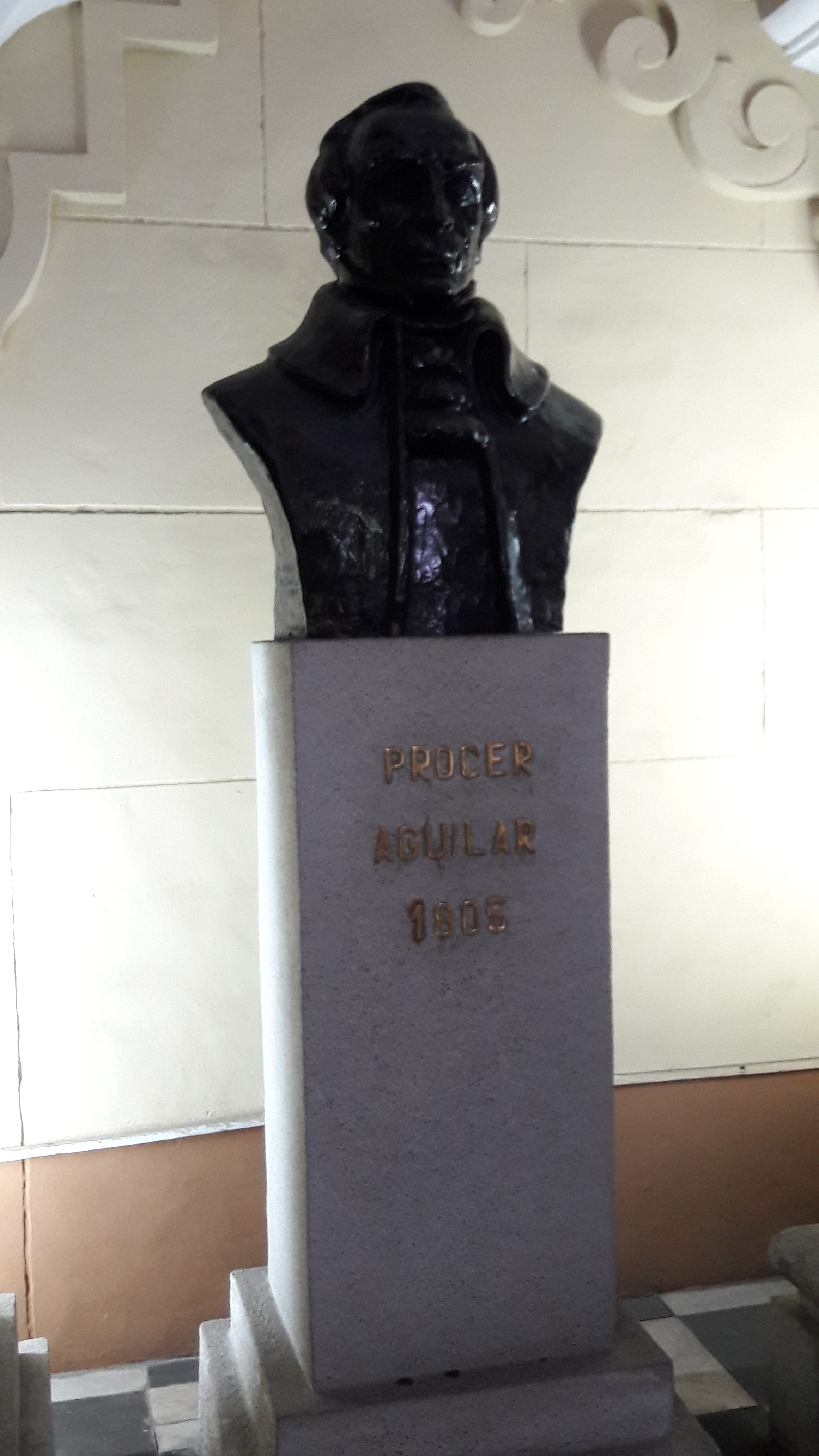 Prócer Aguilar 1805